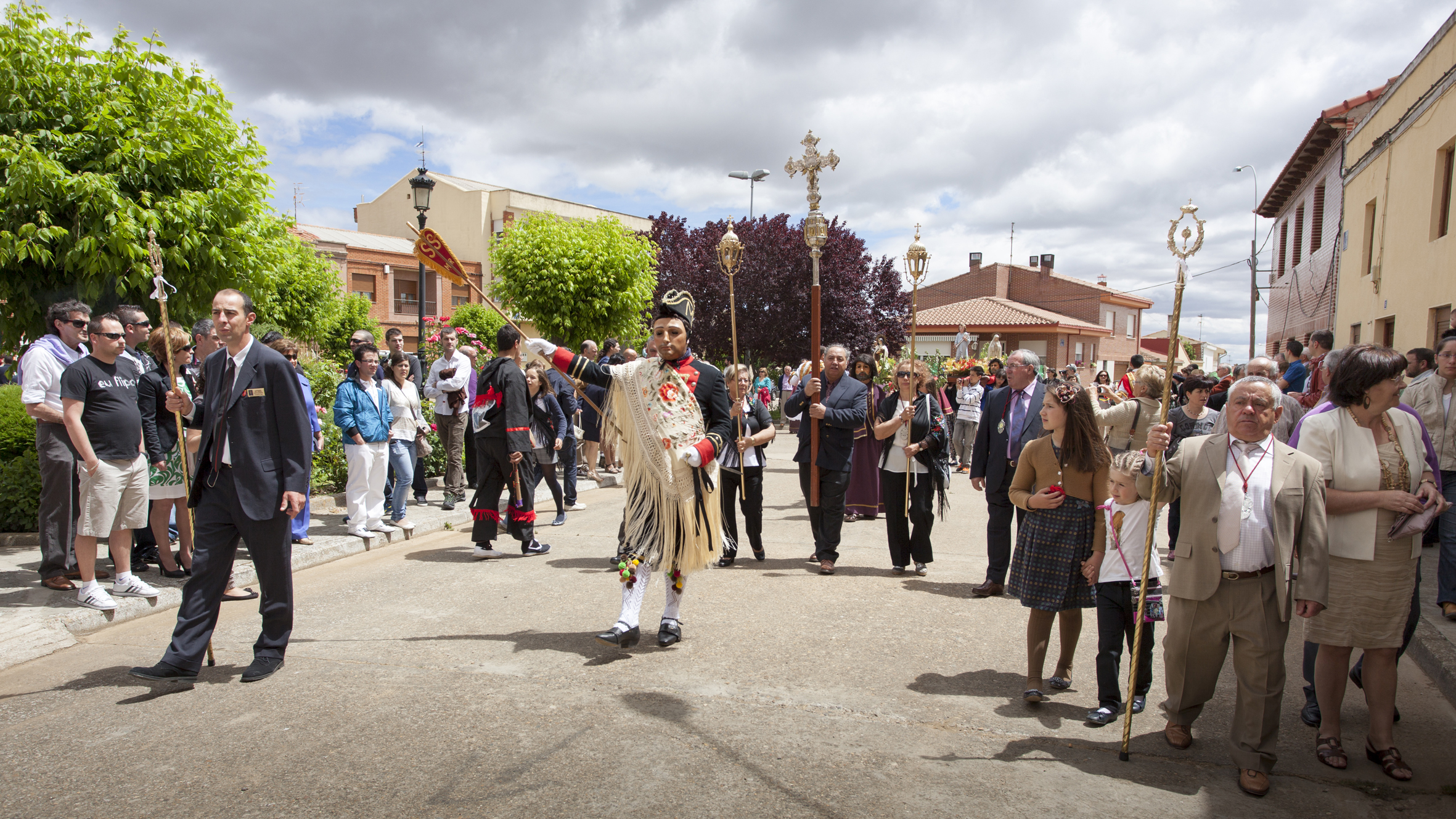 Corpus Christi en Laguna de Negrillos. León, España. Junio 2012. This is a photography of a Folklore festival in Spain (Wikidata id Q17627979).